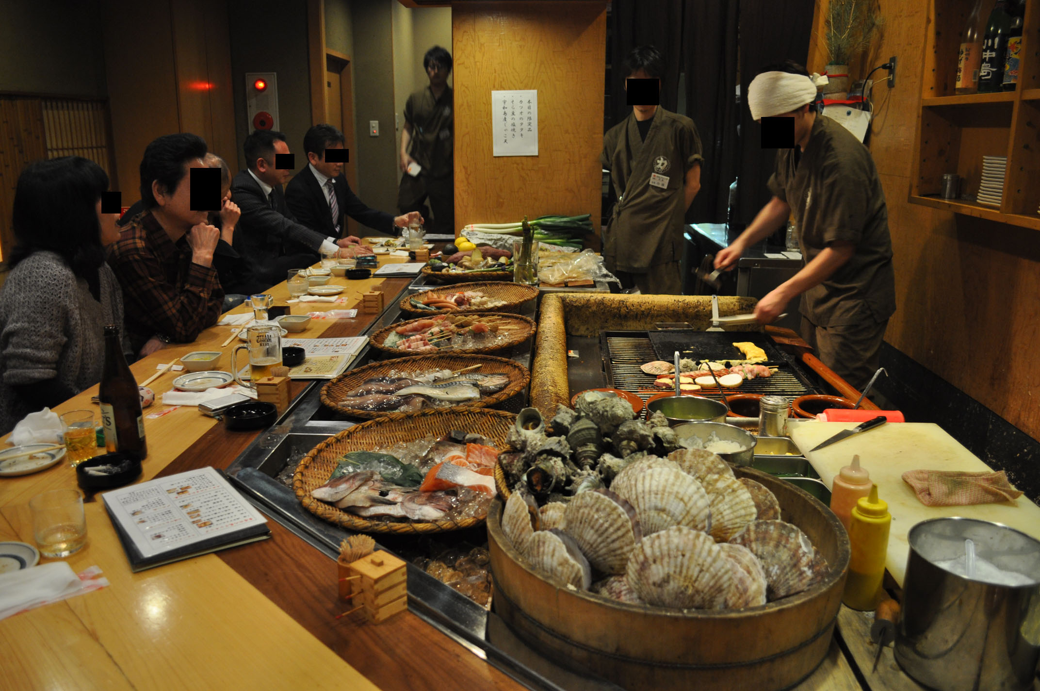 Robatayaki restaurant, Osaka.